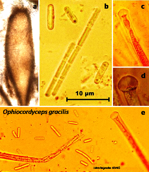 a.Перитеција. b. Споре. c.Аскус са спорама. d. Аскус-апекс. е. Аскус, споре.